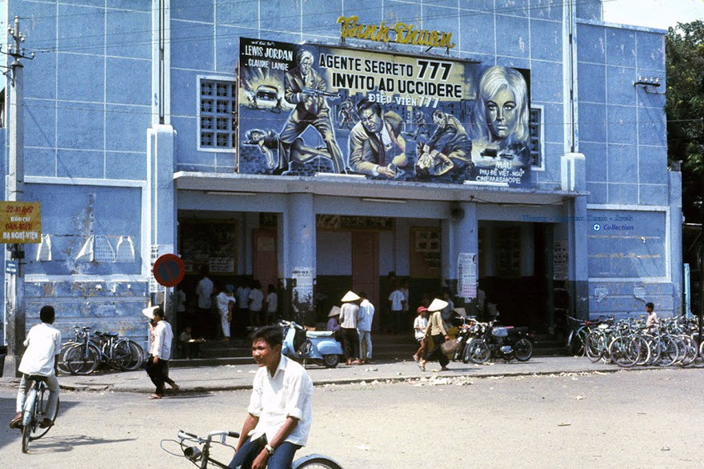 Rạp Bình Thuận - Phan Thiết 1966/68 - Photo by Edwards